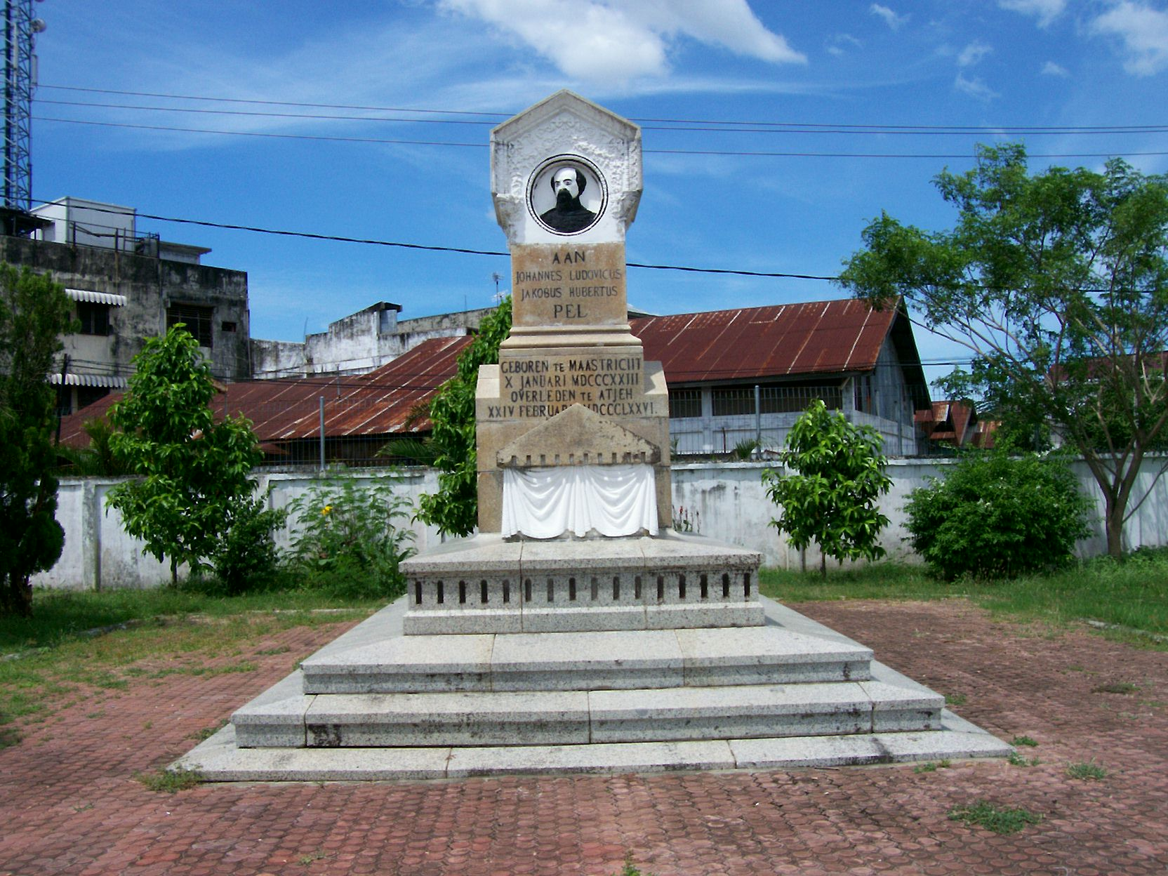 Makam Jenderal J.L.J.H. Pel di Peucut, Banda Aceh